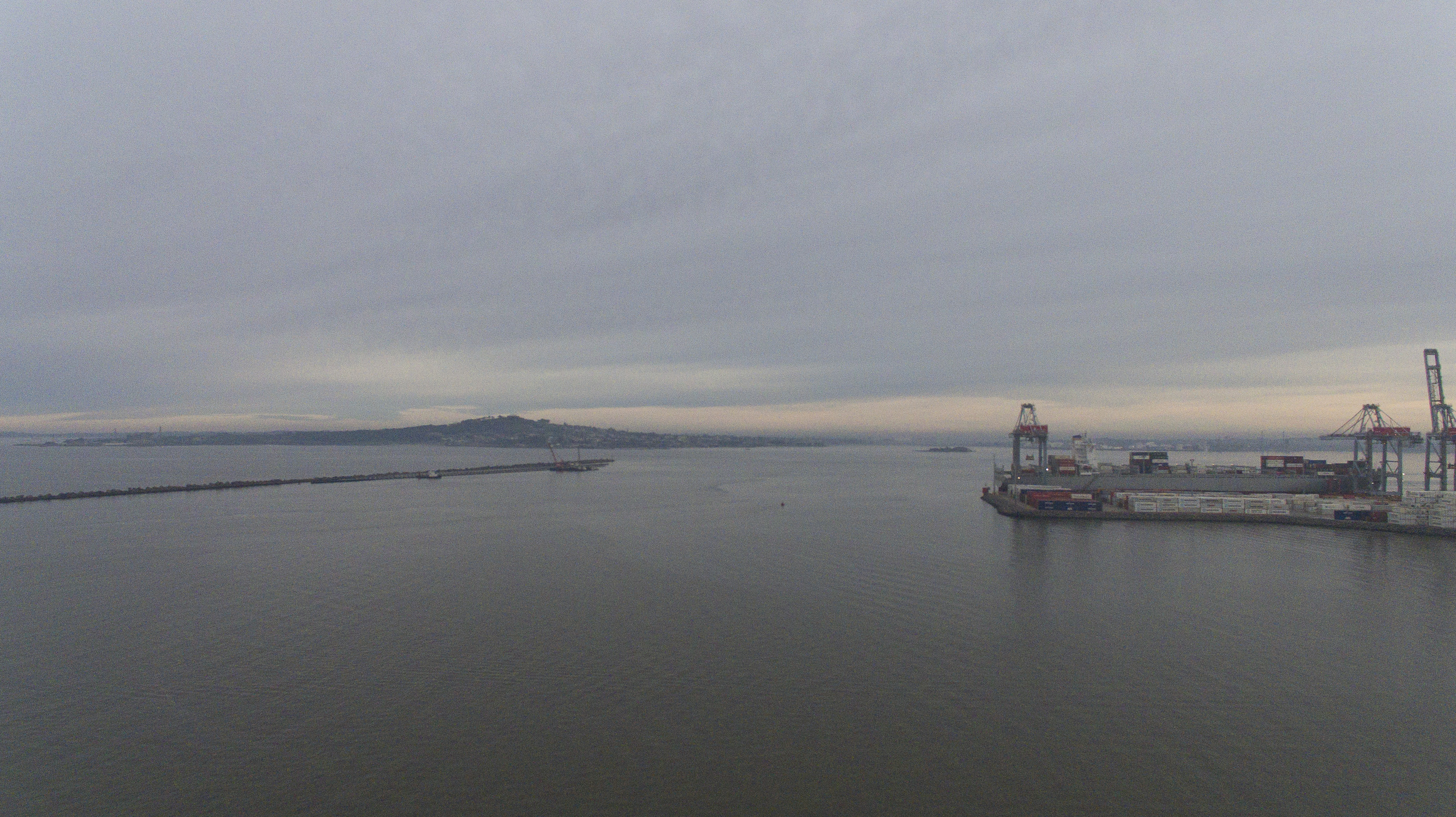 Puerto Montevideo, Uruguay, toma aérea